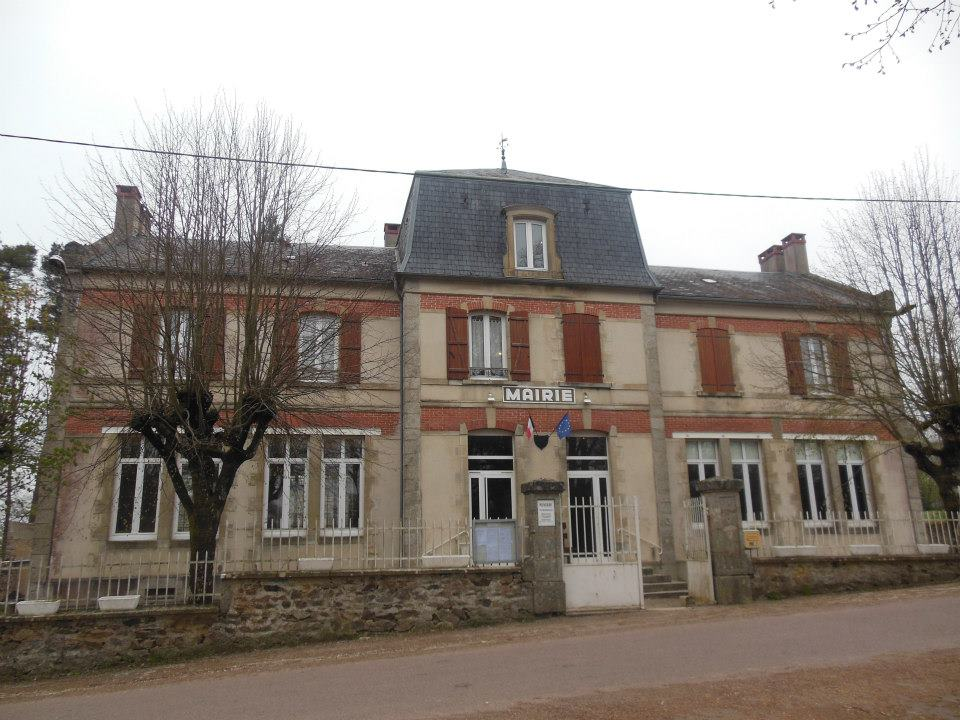 Mairie de Chastellux-sur-Cure (89).